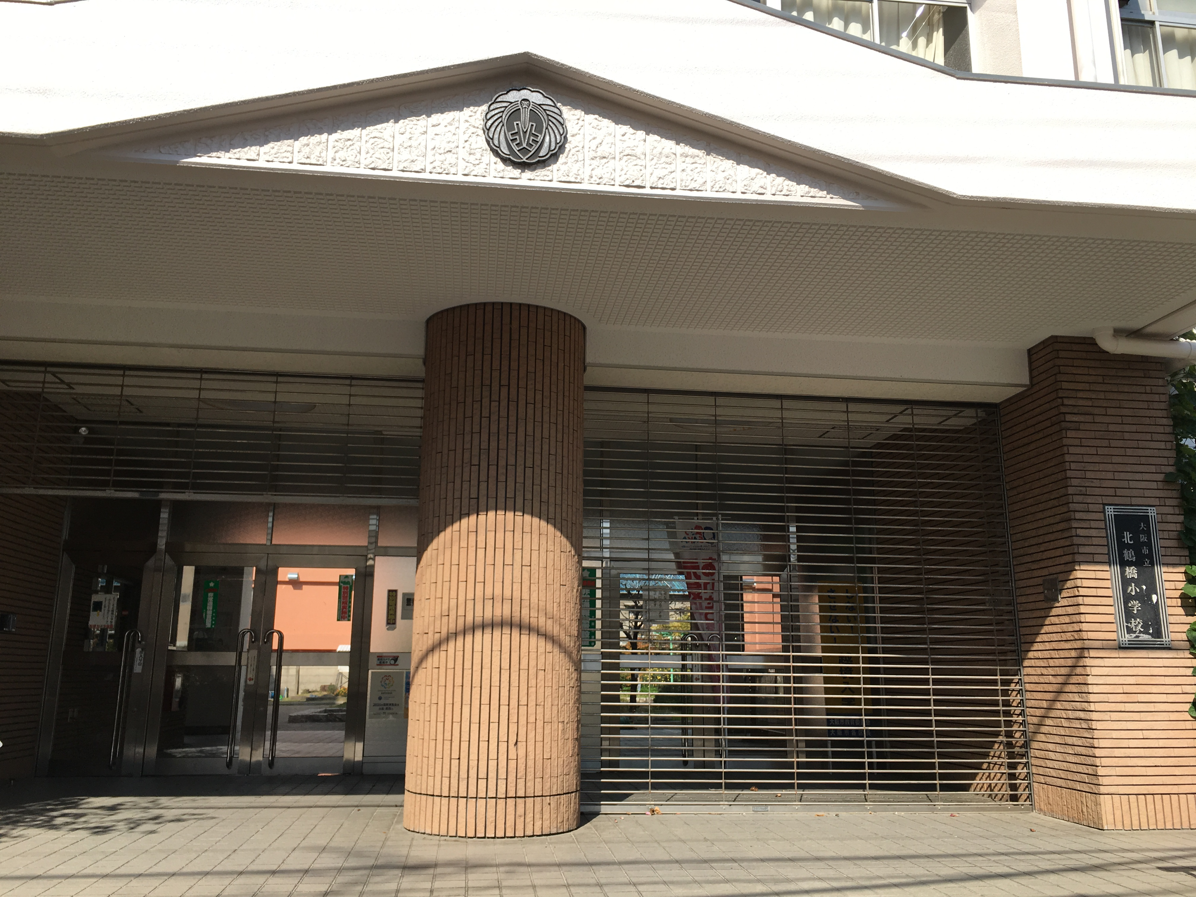 北鶴橋小学校